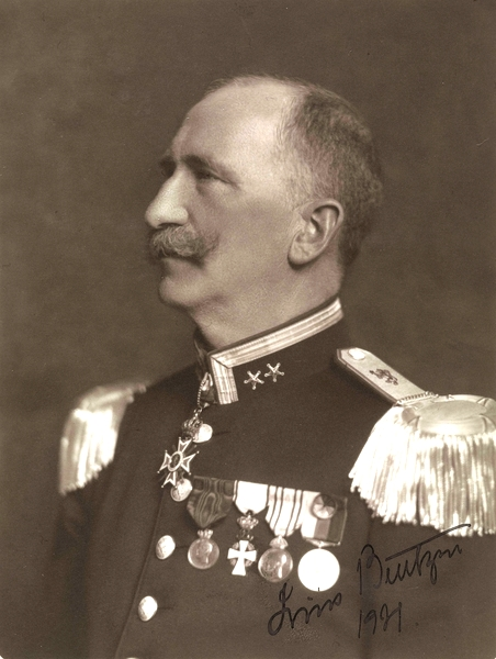 portrett, mann, direktør for Statens gymnastikkskole, uniform, medaljer, brystbilde, profil.